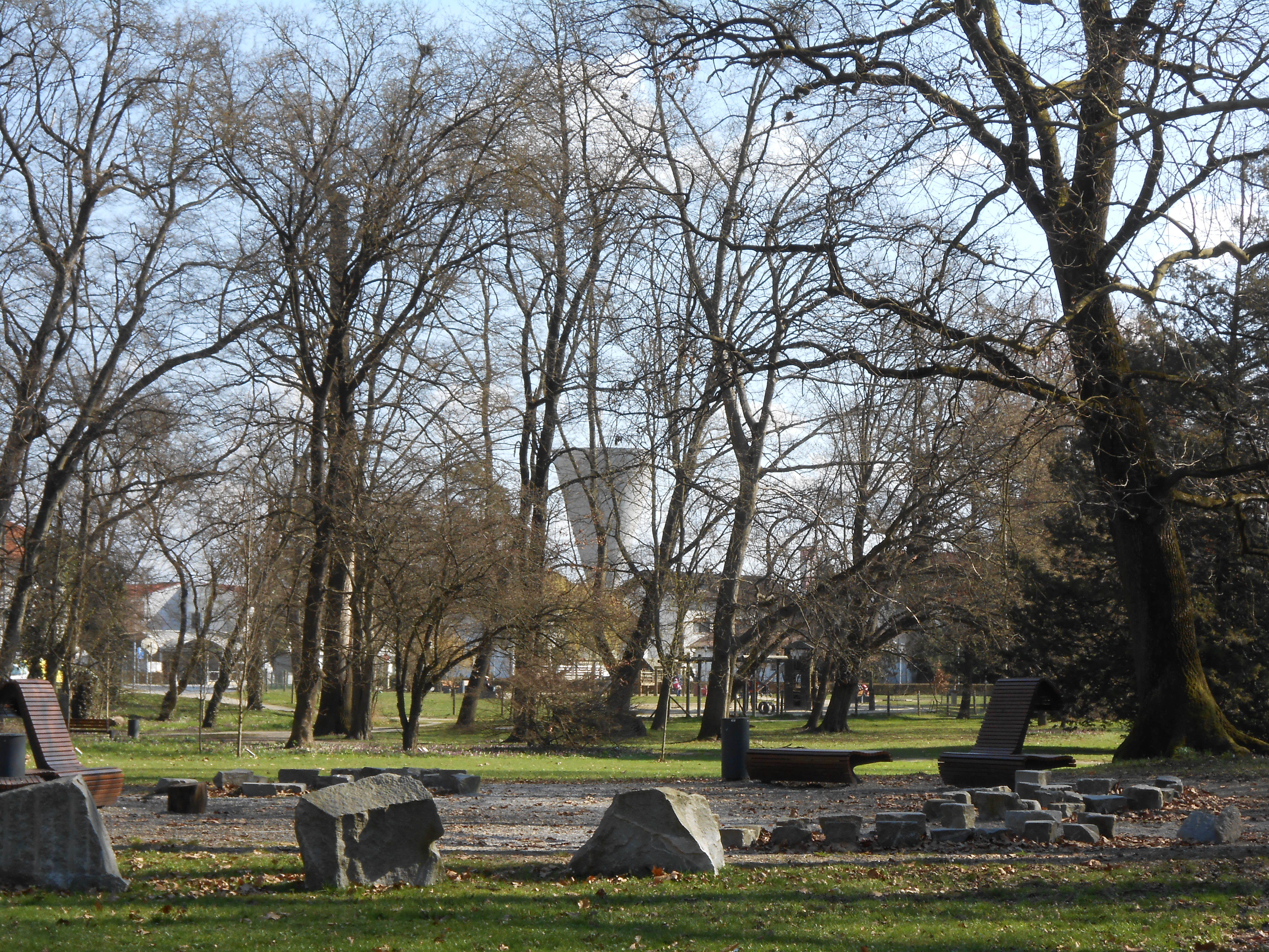 Učilnica na prostem - prostor za sproščanje, učenje in druženje